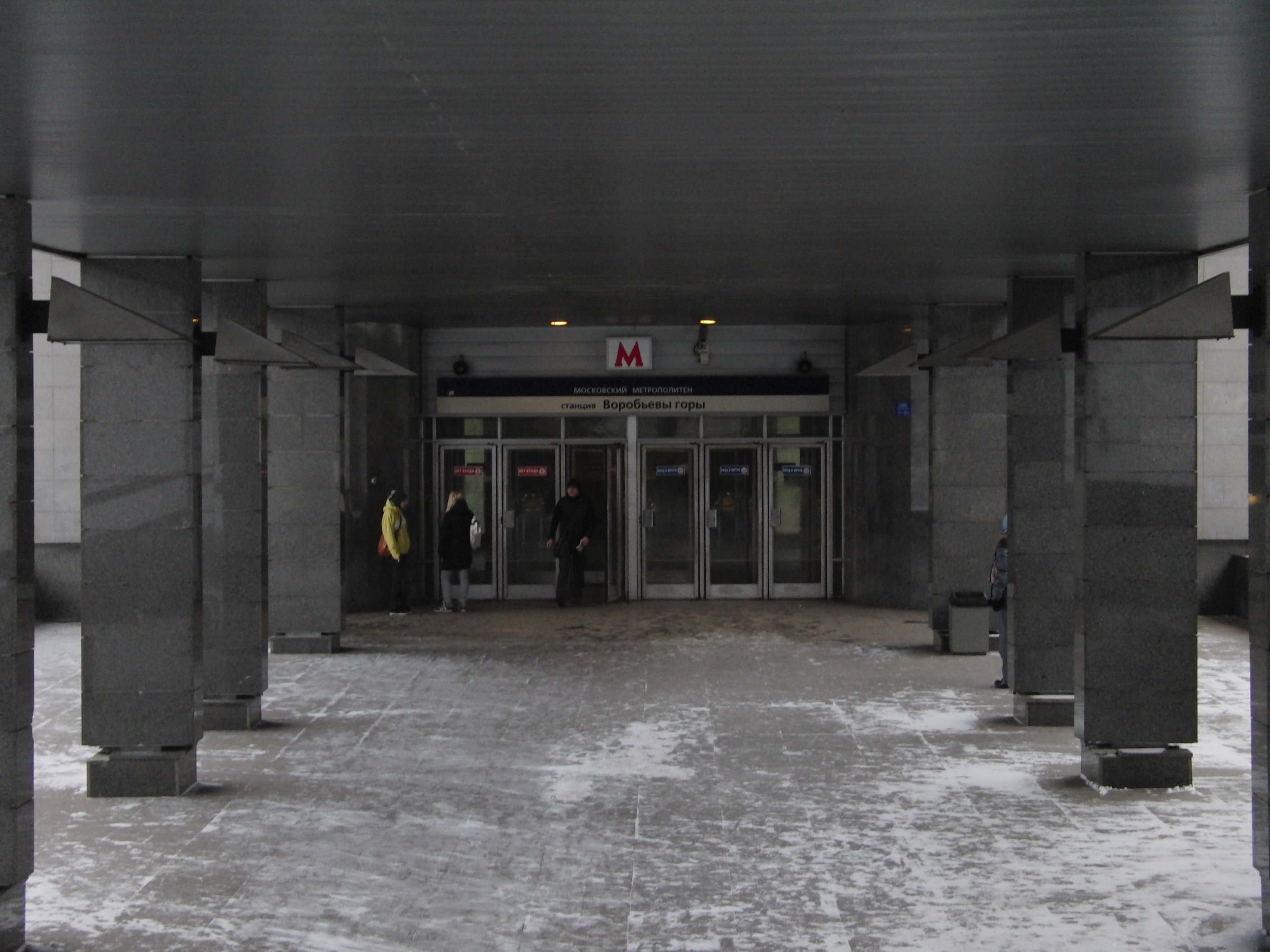 Vorobyovy Gory (Воробьёвы Горы)